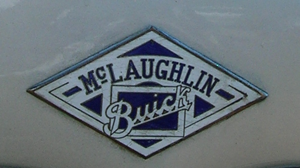 1924 McLaughlin Buick